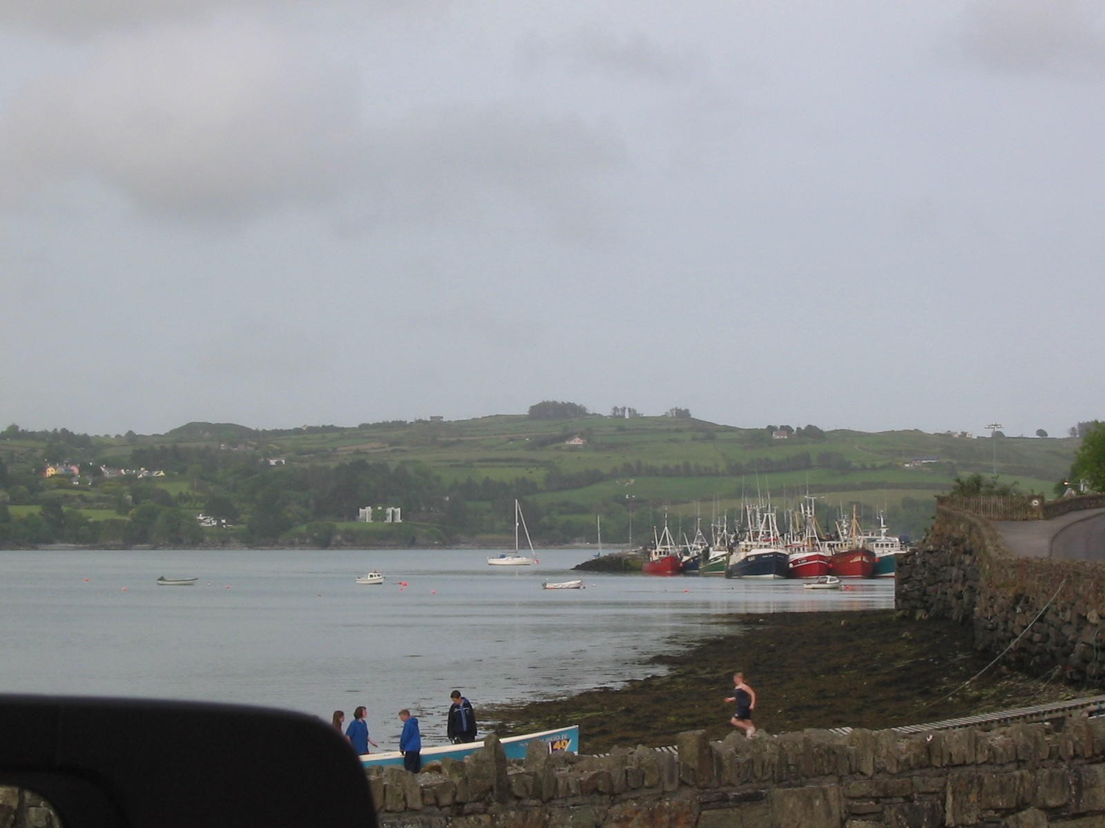 Der Ort Unionhall